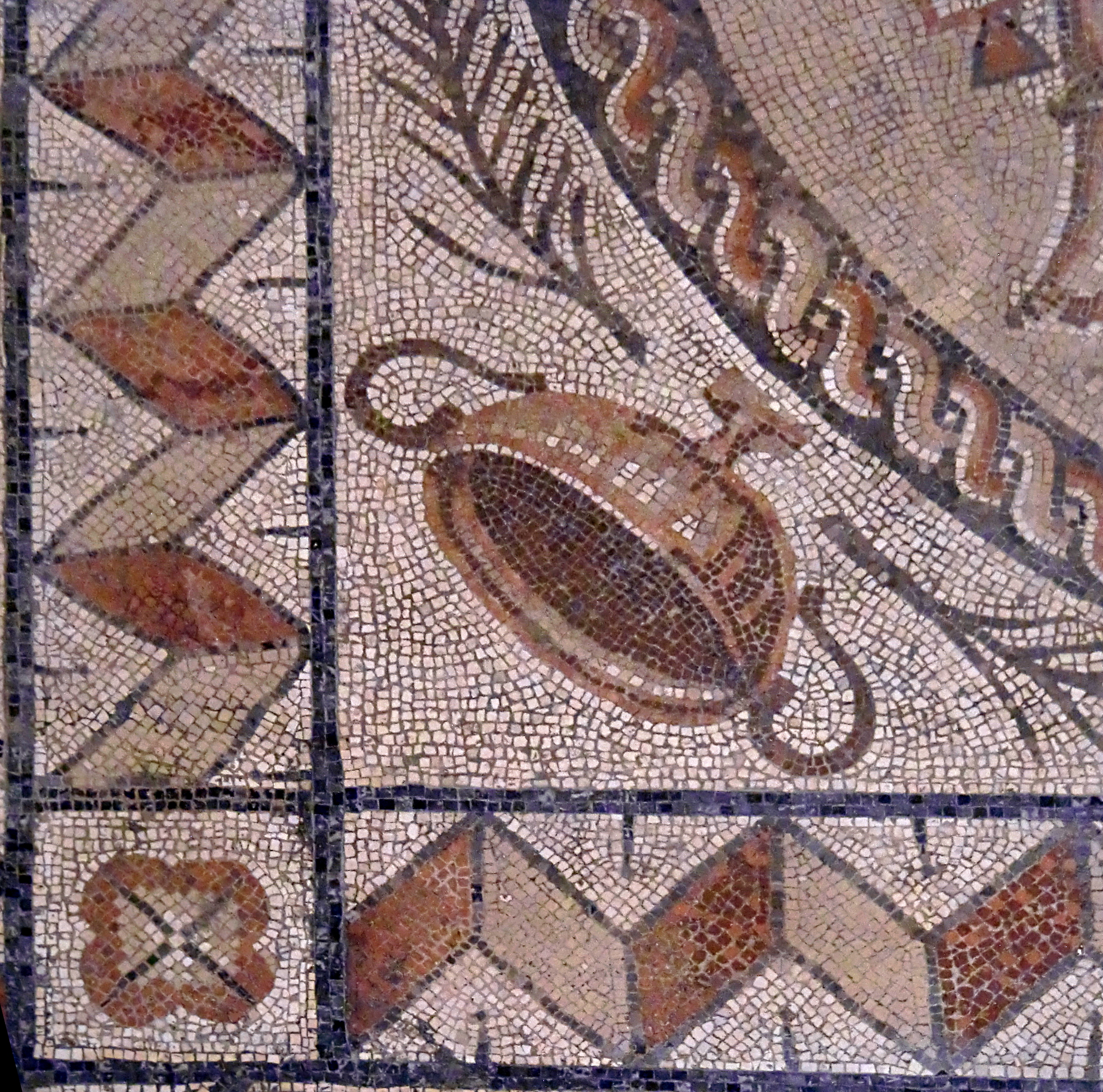 Mosaïque de Lillebonne - détail